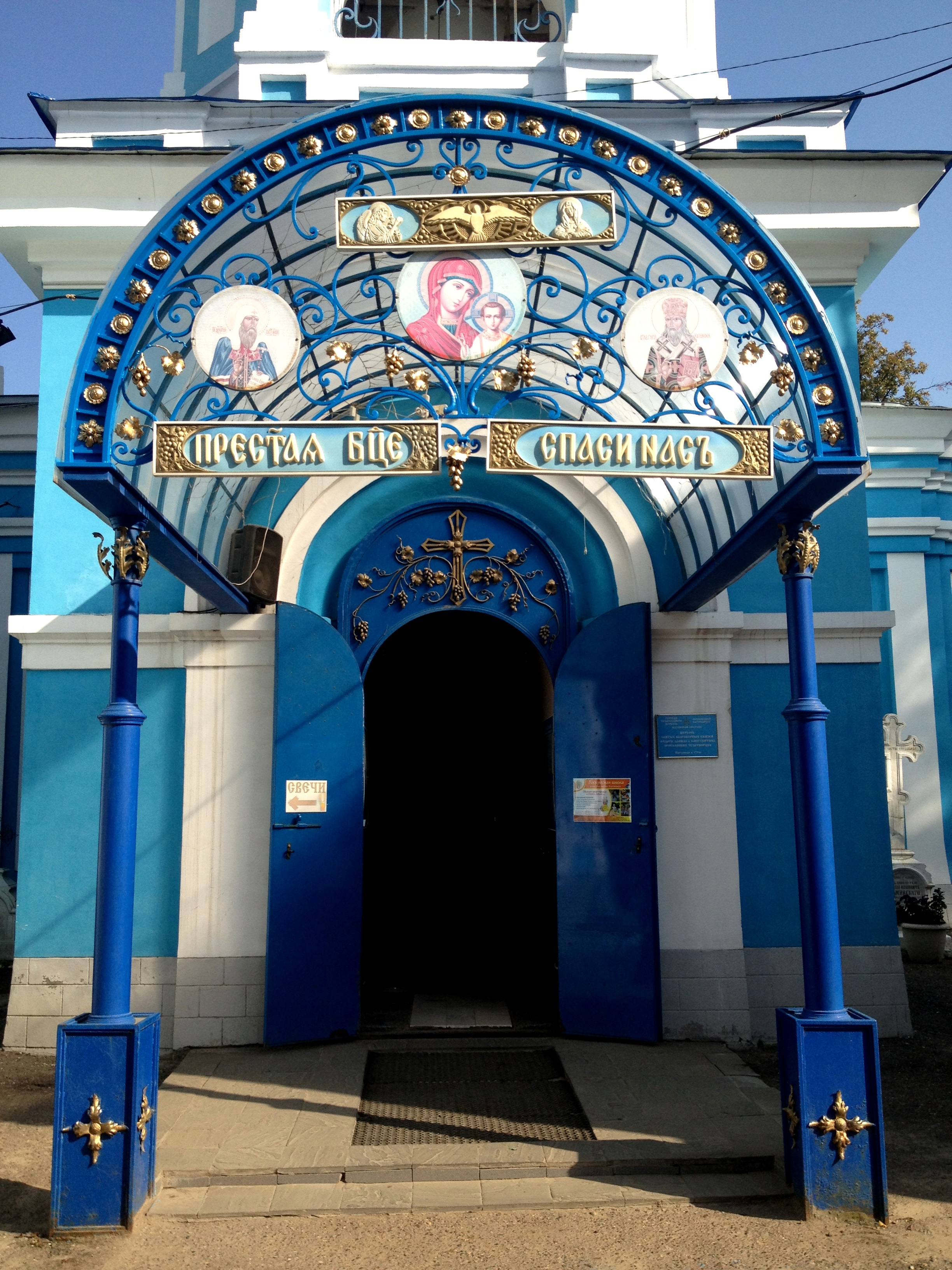 Церковь Ярославских Чудотворцев: Арское кладбище, Казань, Татарстан